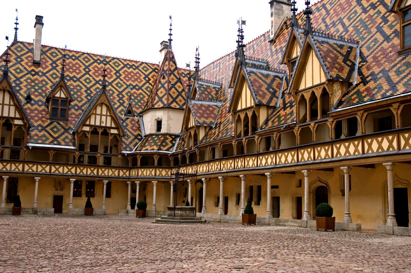 Hotel Dieu de Beaune en Bourgogne